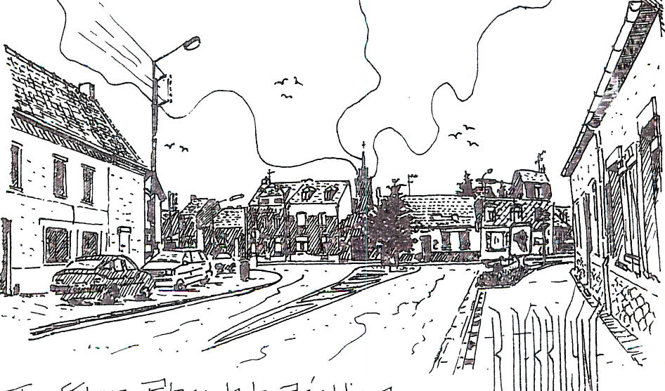 la place de la République